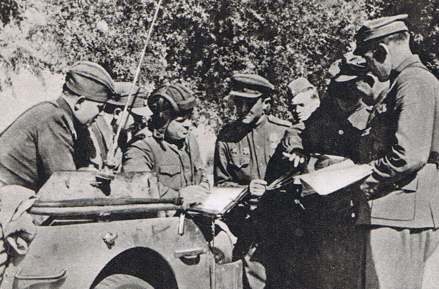 gen. bryg. Jan Mierzycan, Przyczółek warecko-magnuszewski